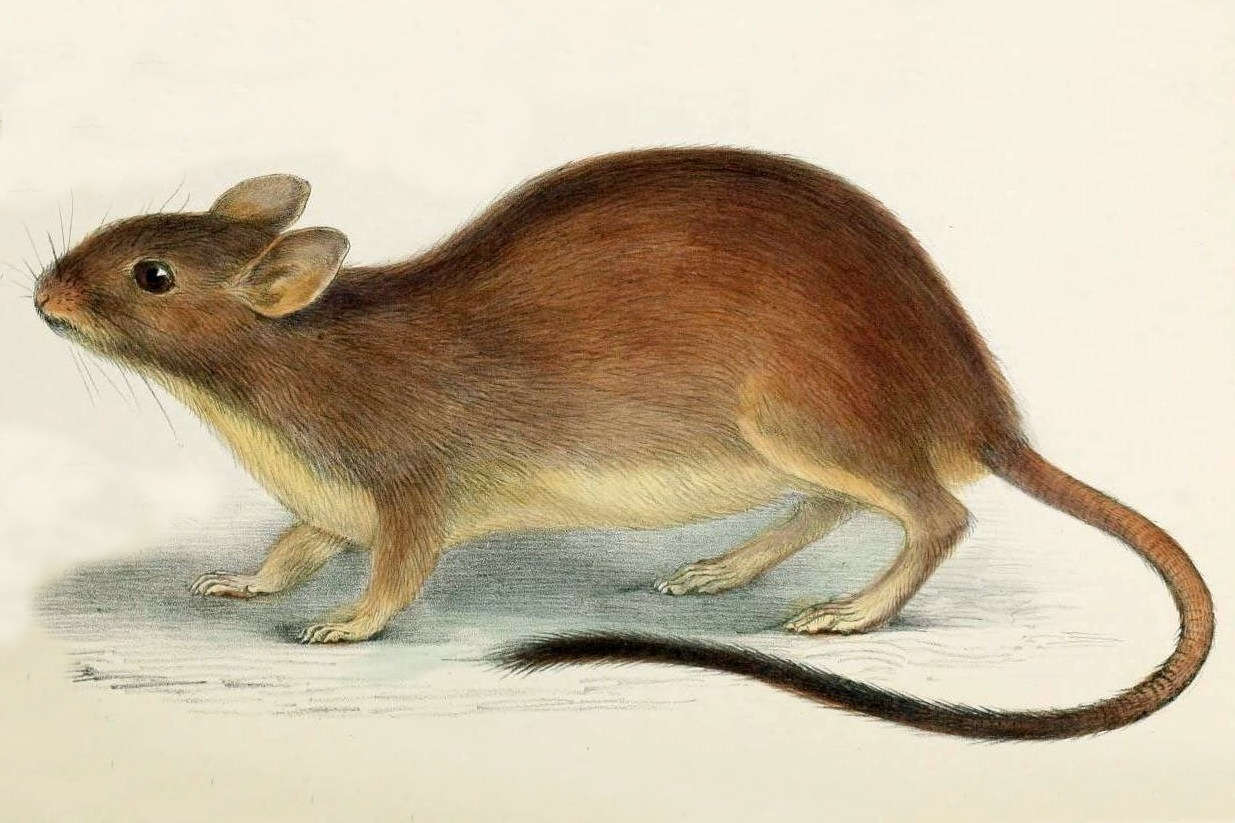 "Hapalotis melanura" = Conilurus penicillatus'